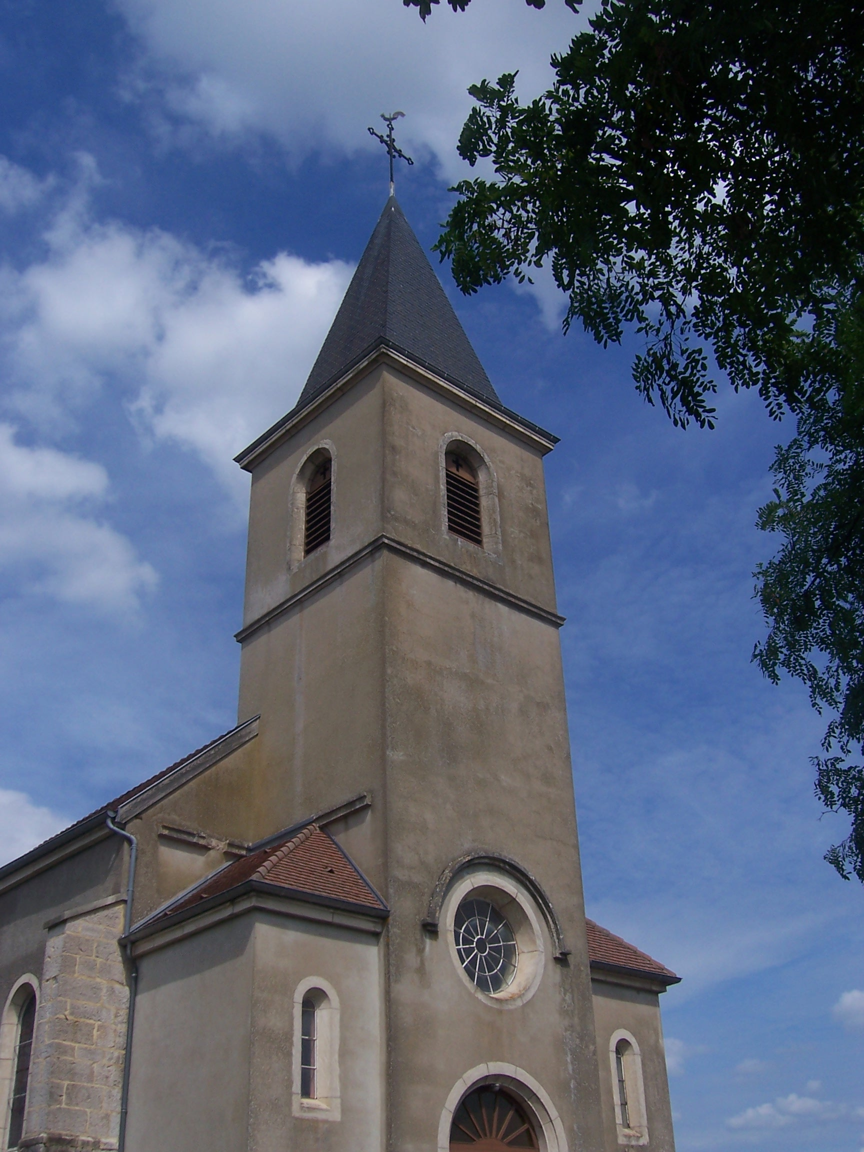 Eglise de Vincelles